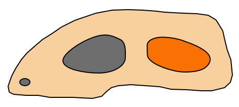 Schädel synapsid